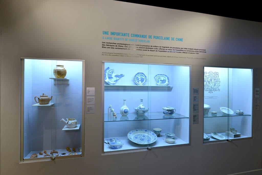 Présentation des collections Lapérouse au Musée maritime de Nouvelle-Calédonie, cliché Eric Dell’Erba.